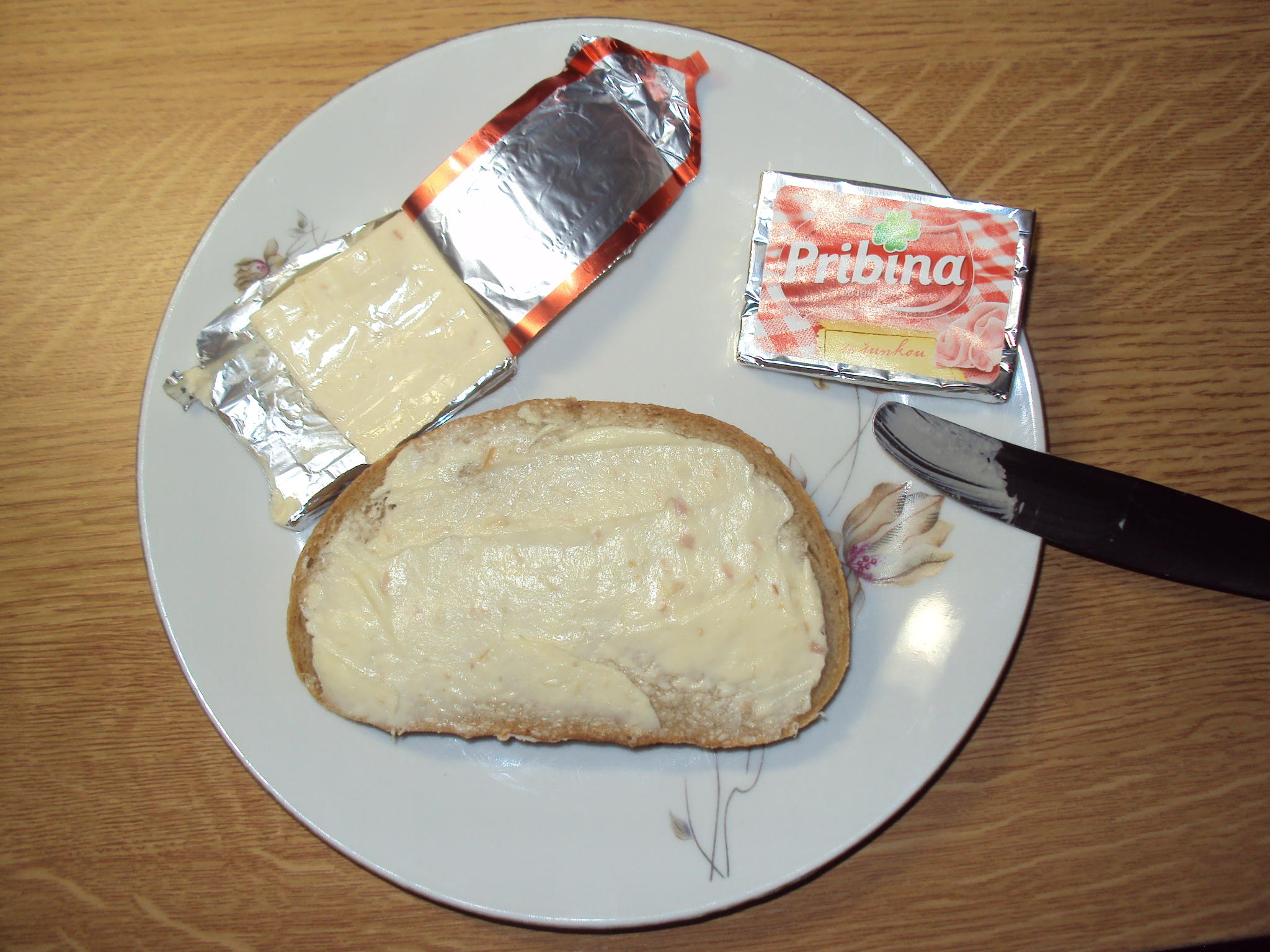 Snídaně s českým sýrem Pribina